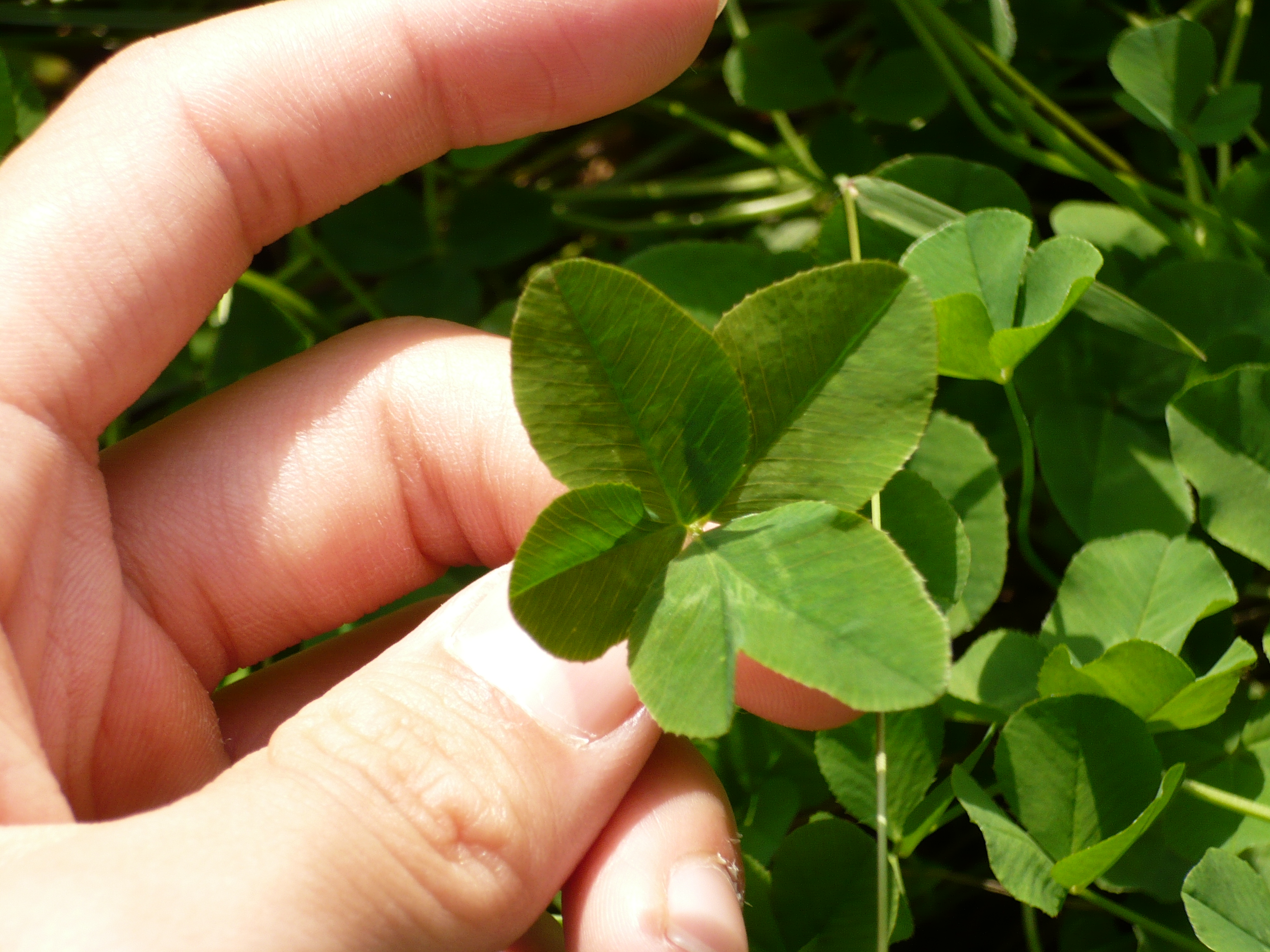 五つ葉のクローバー